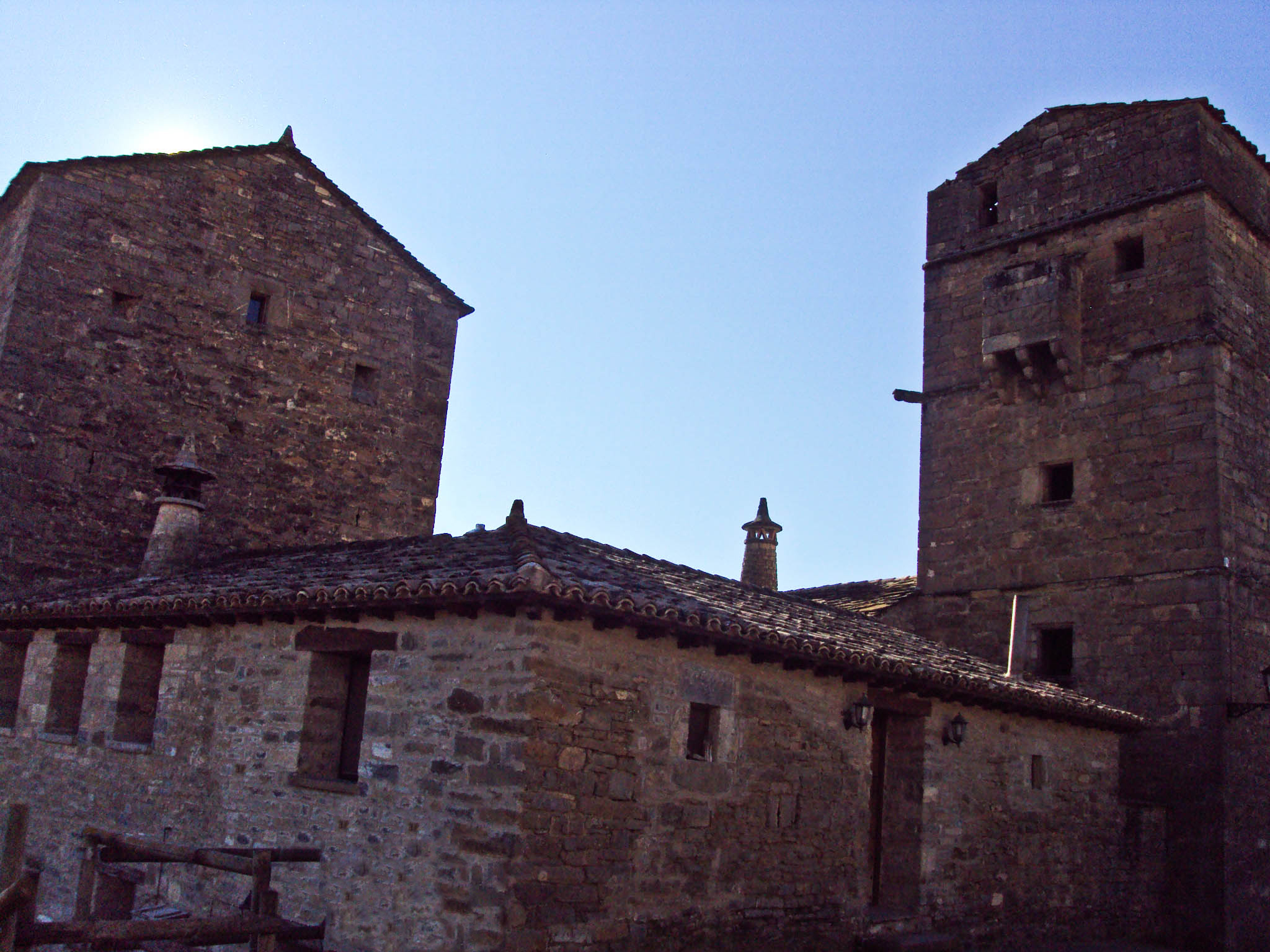 Vista exterior de la casa fortificada de los Mur de Aluján